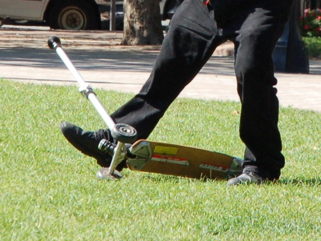 K2 Kicktwo